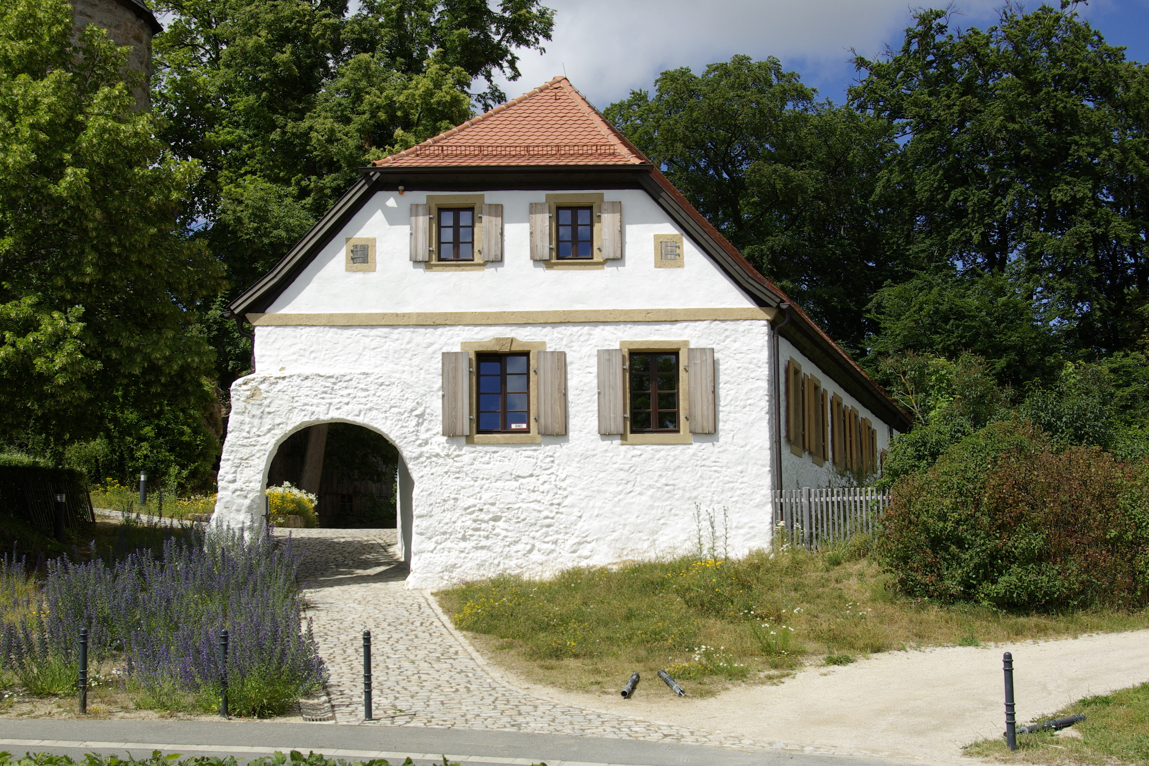 Ehemaliger Gutshof der Burg Zwernitz.